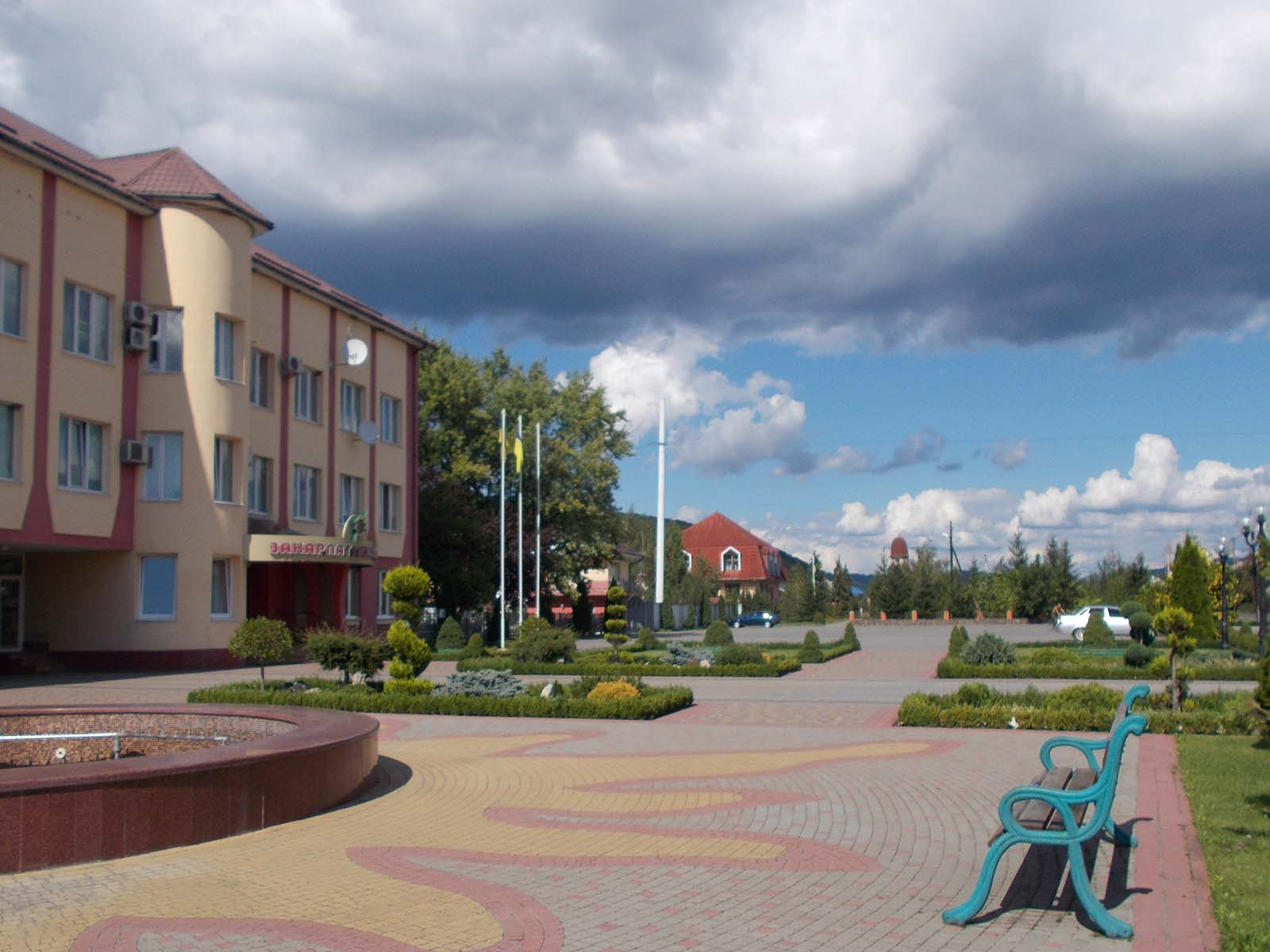 перед ПАТ Закарпаттяобленерго